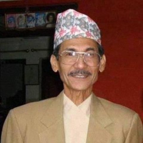 डोटेली: Nepali Leader